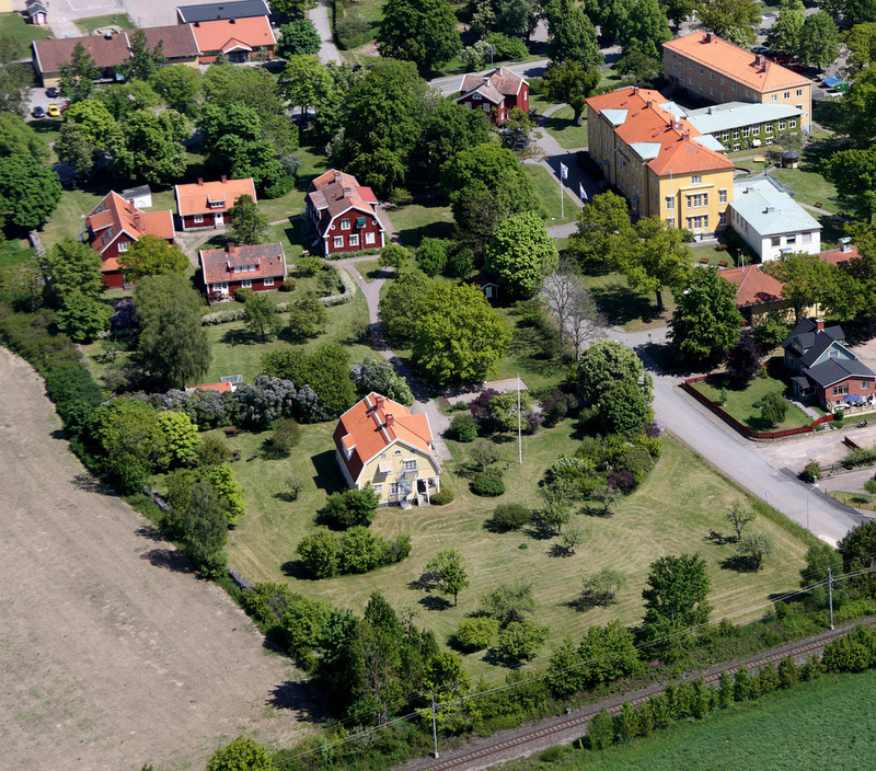 Flygbild över Högalids Folkhögskola